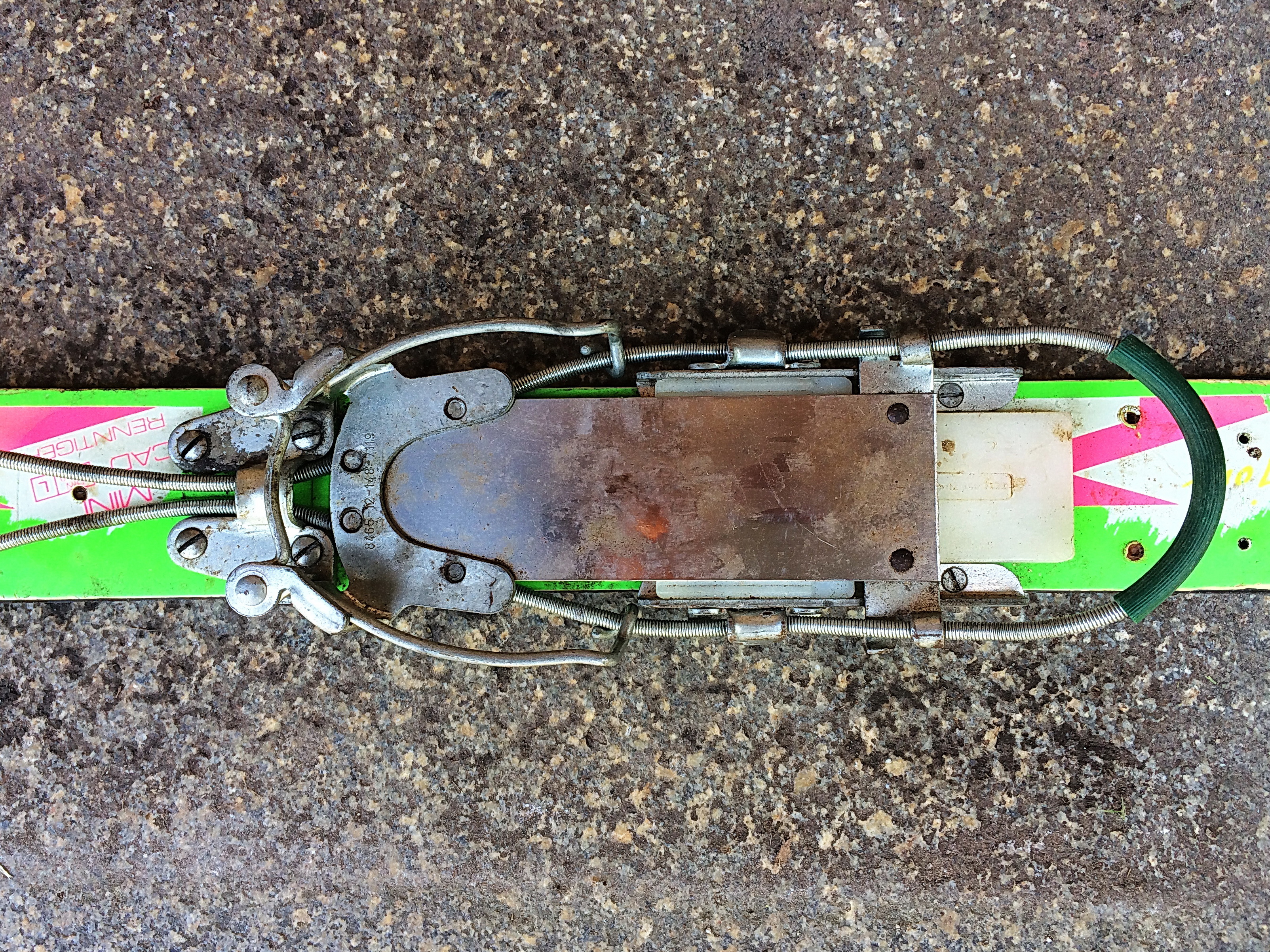 "Einheitsbindung"/Tourenbindung "Haute Route" mit Platte für den militärischen/zivilen Skilauf, montiert auf zivilem Ski